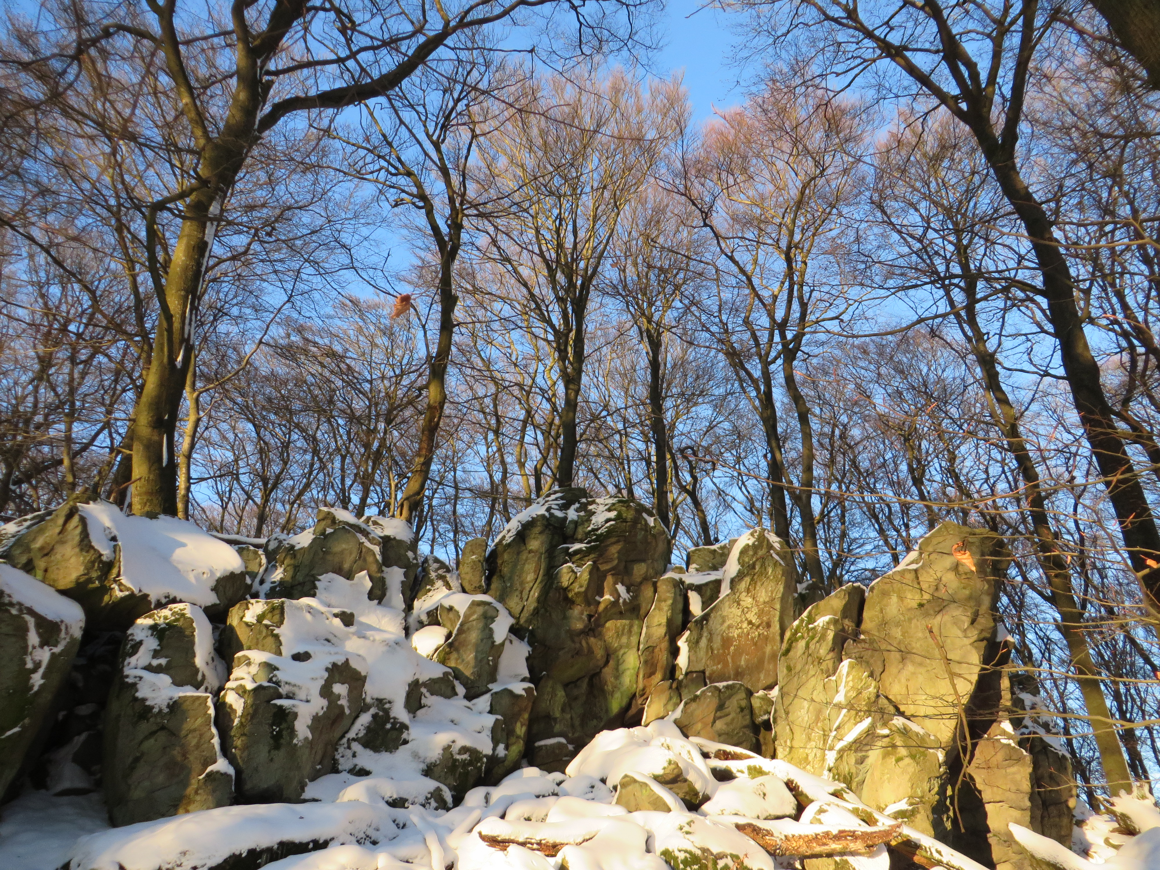 Felsformation auf dem Malberg (Westerwaldkreis) im Winter